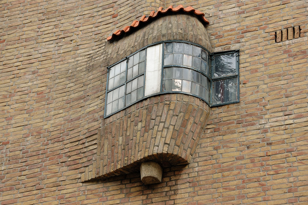 Woonhuis Amsterdamse School, architect Michel de Klerk